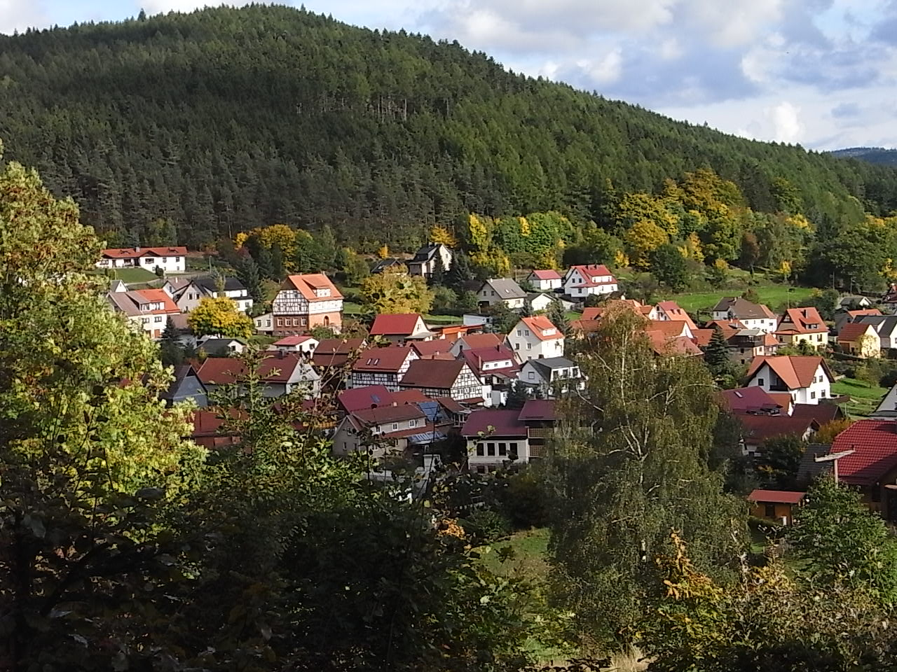 Blick auf Altersbach